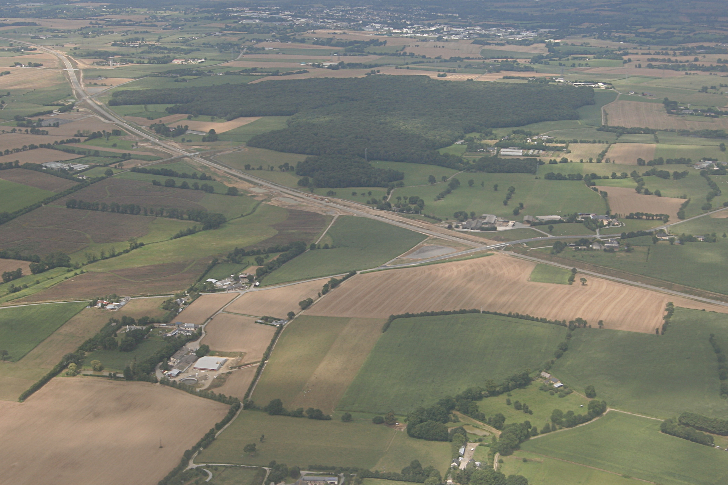 Vue aérienne du chantier de la LGV Bretagne-Pays de la Loire à Noyal-sur-Vilaine.